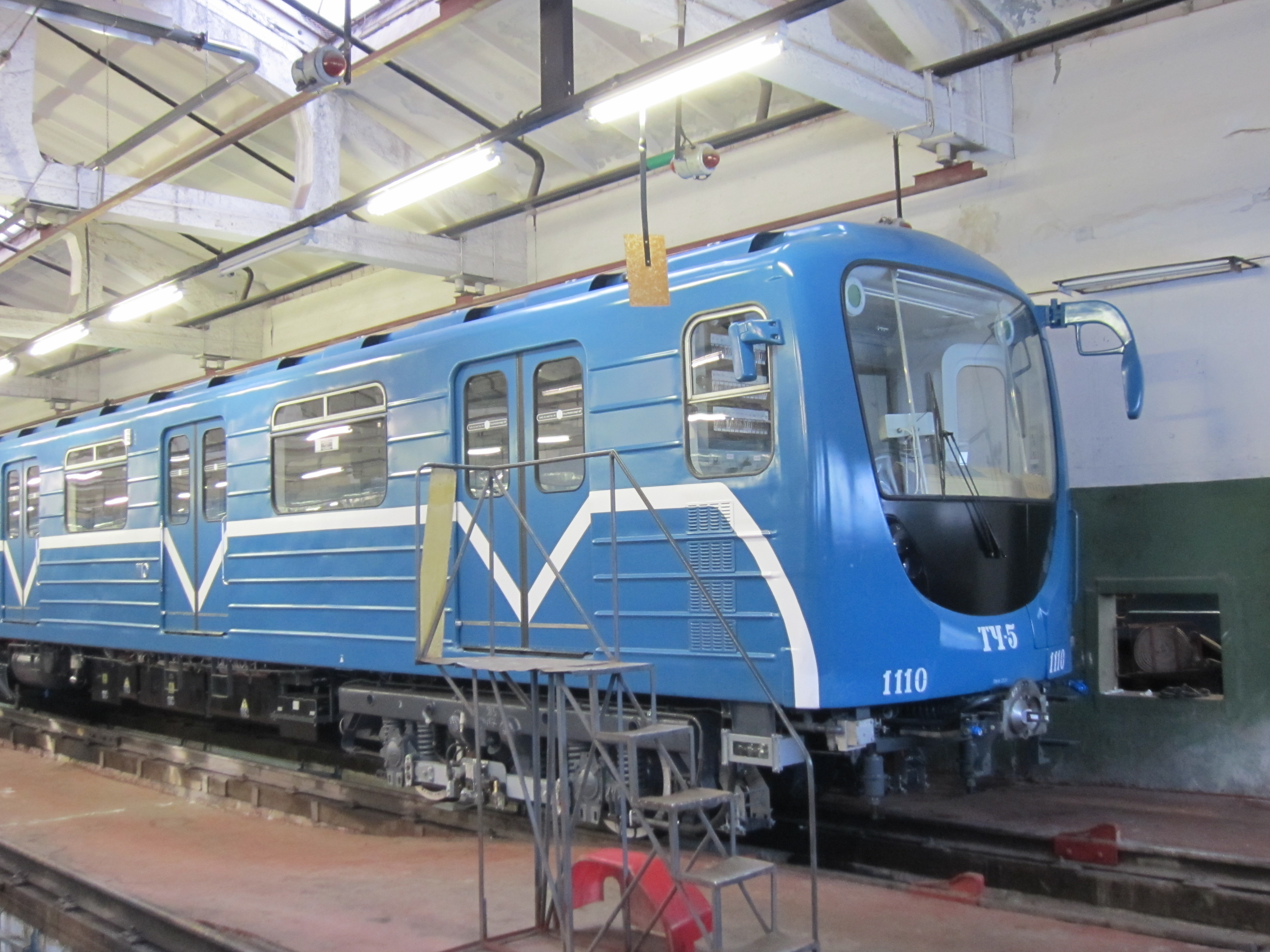 Вагон метро модели 81-717.5П в электродепо Невское